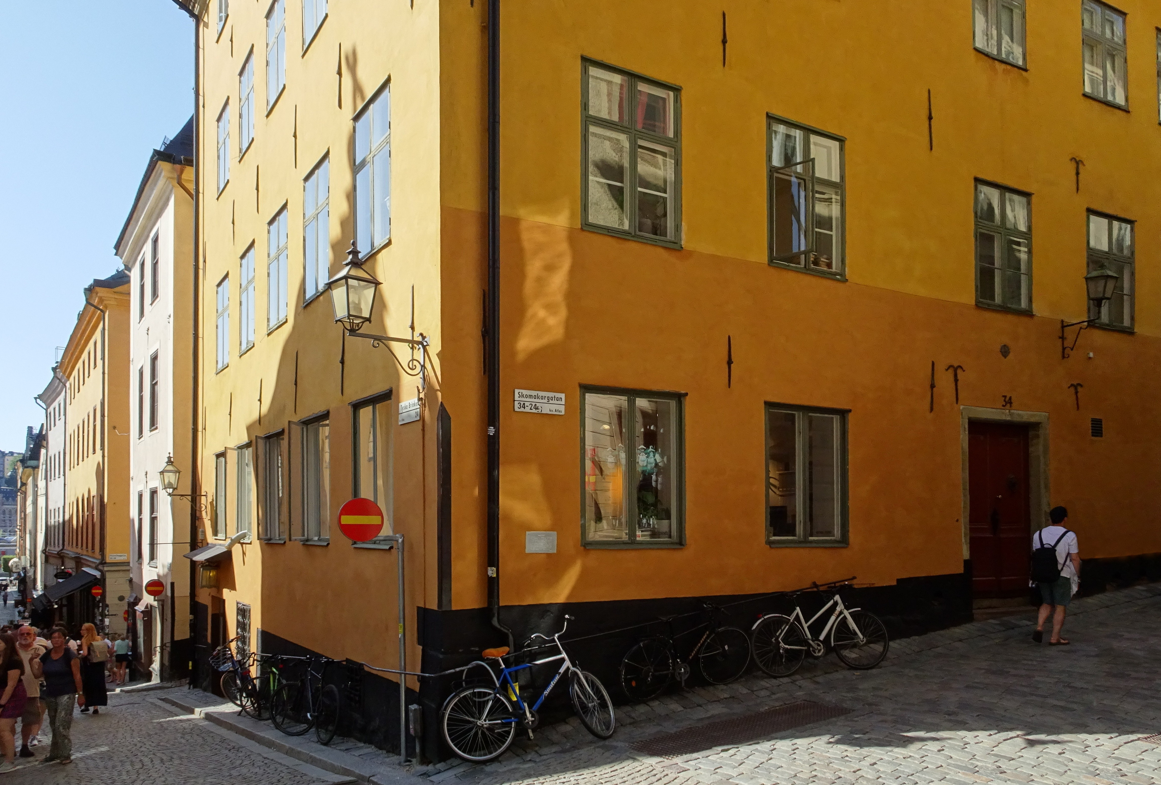 Fastigheten Atlas 8 vid Tyska Brinken, tidigare plats för den kända krogen "Förgyllda Lejonet"